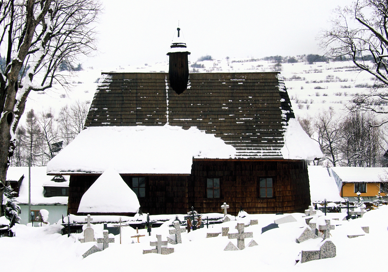 Trybsz, (stary) kościół św. Elżbiety Węgierskiej z 1567 r. [(Old) Curch of St. Elżbieta Węgierska in Trybsz]